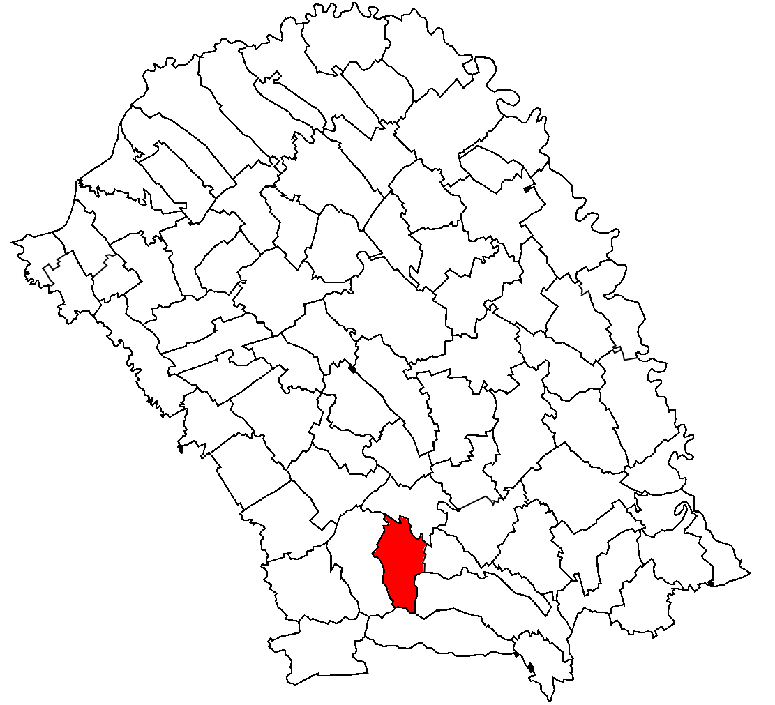 Categorie:Hărţi ale judeţului Botoşani